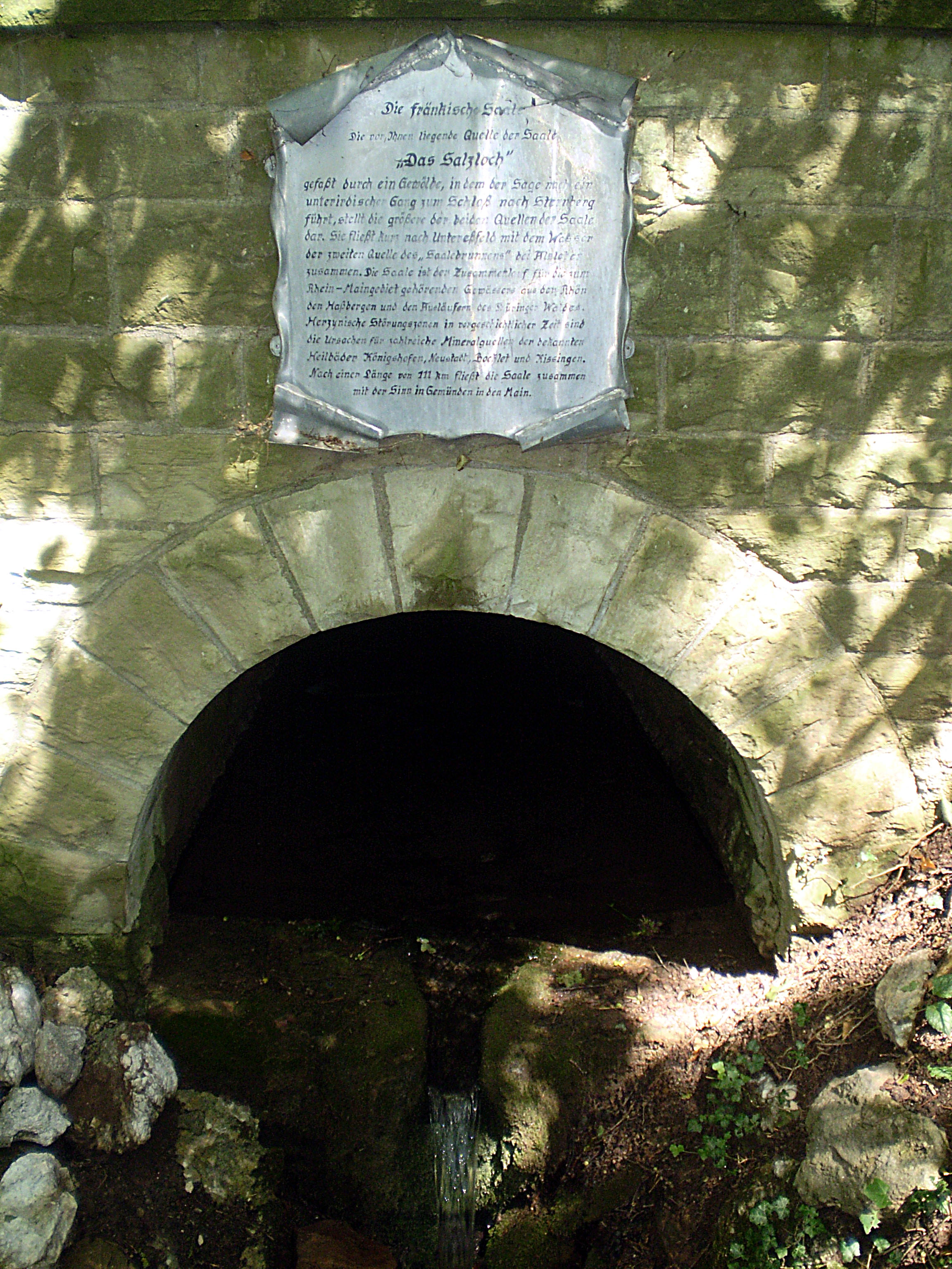 Die Fränkische Saale Die vor Ihnen liegende Quelle der Saale "Das Salzloch" ... [1]